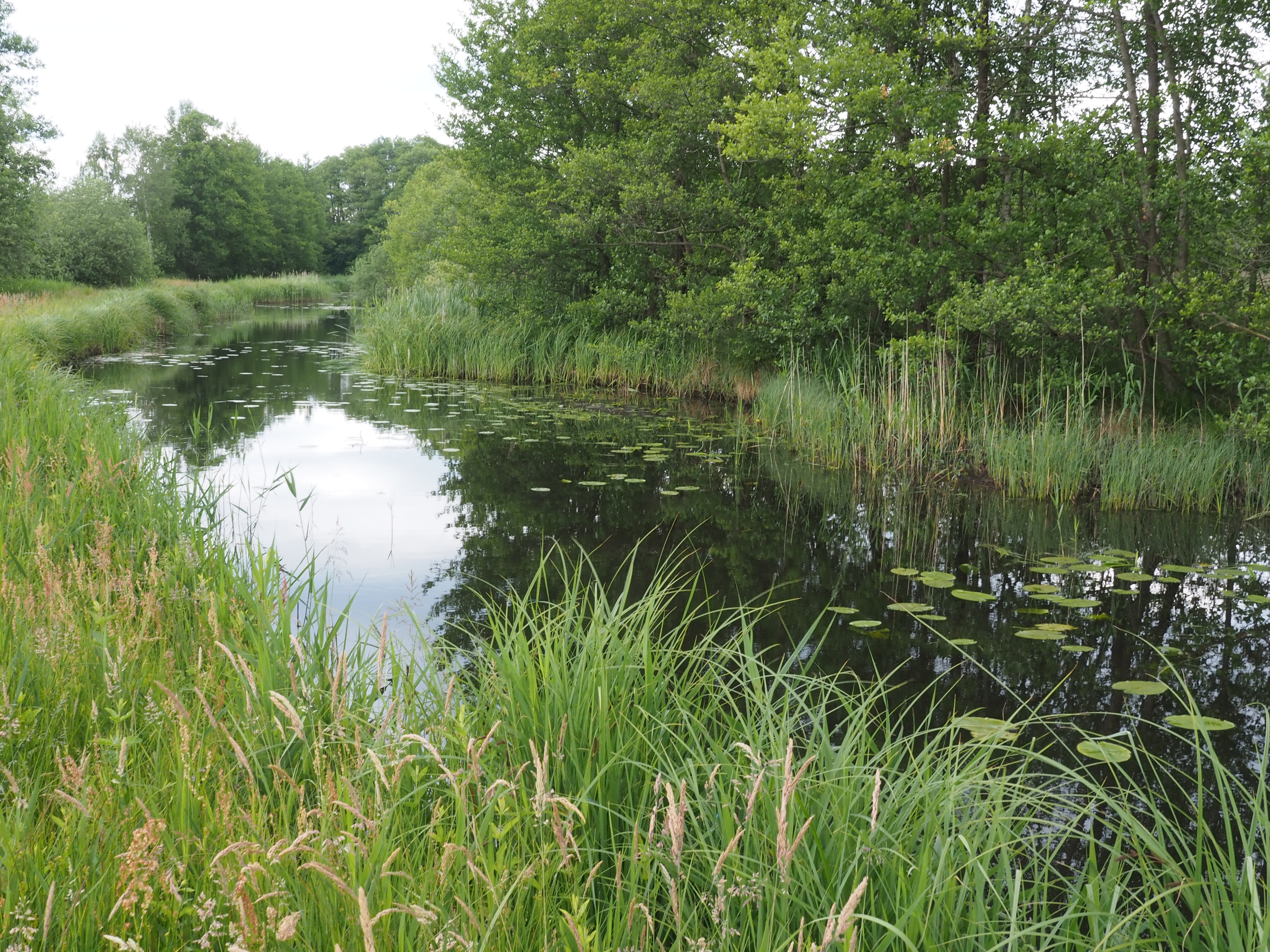 Bruchbach beim Entenfangs in Boye, Stadt Celle, Niedersachsen